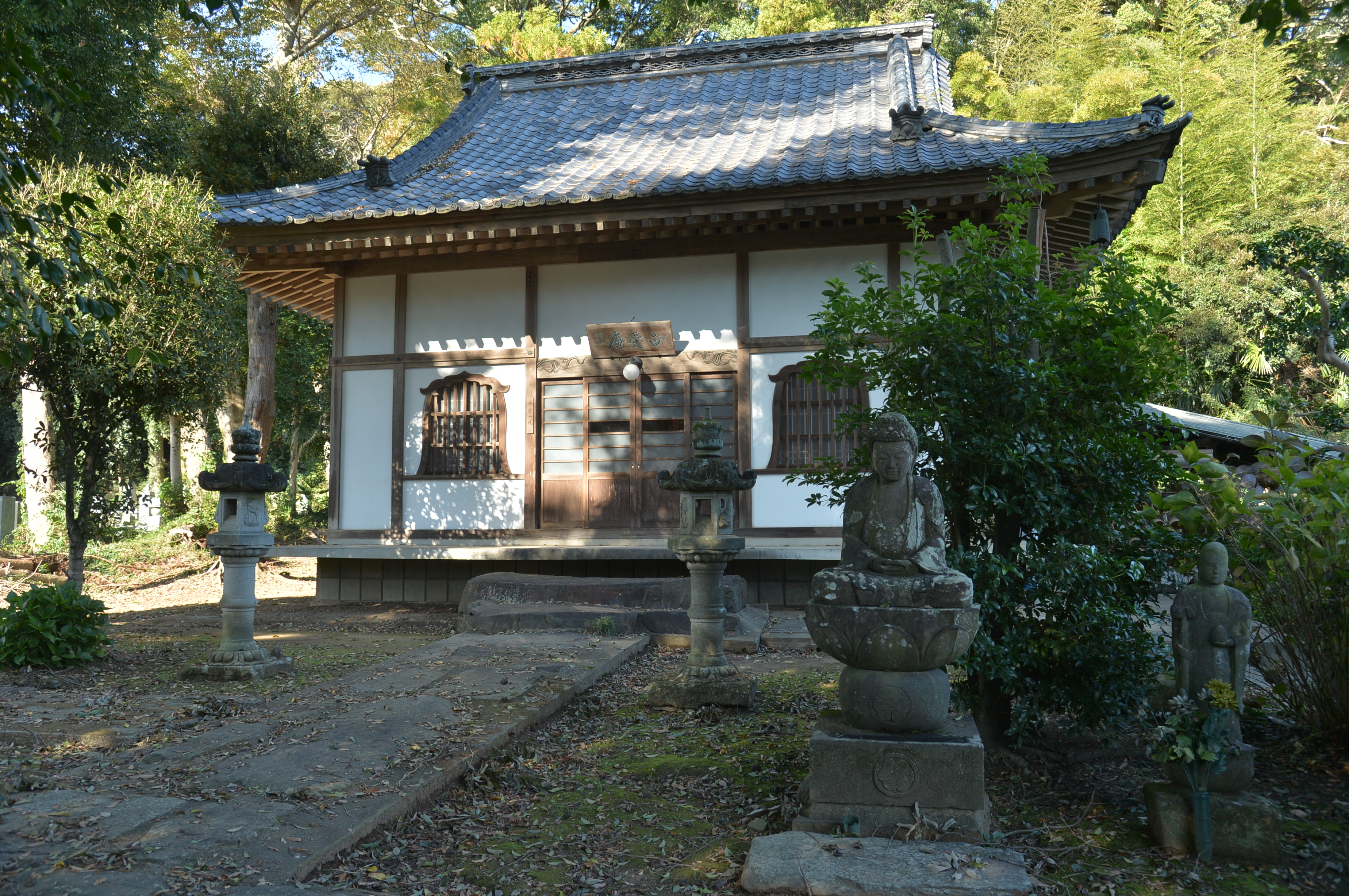 法雲寺の堂宇のひとつである「正受庵」。茨城県土浦市高岡1890。